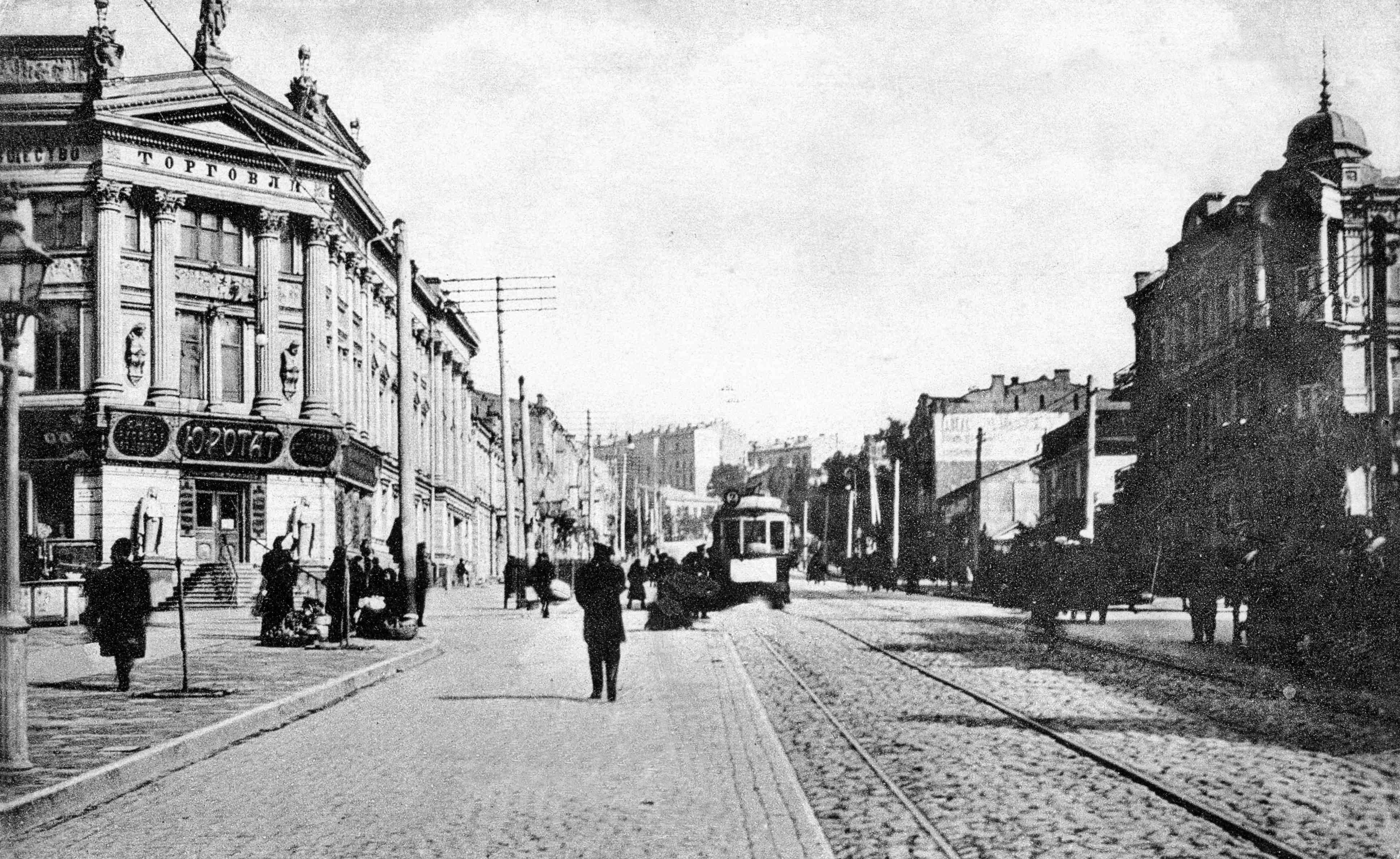 Будинок товариства торгівлі аптекарськими товарами (зліва), Будинок з іфритами (справа), Київ, Вулиця Симона Петлюри